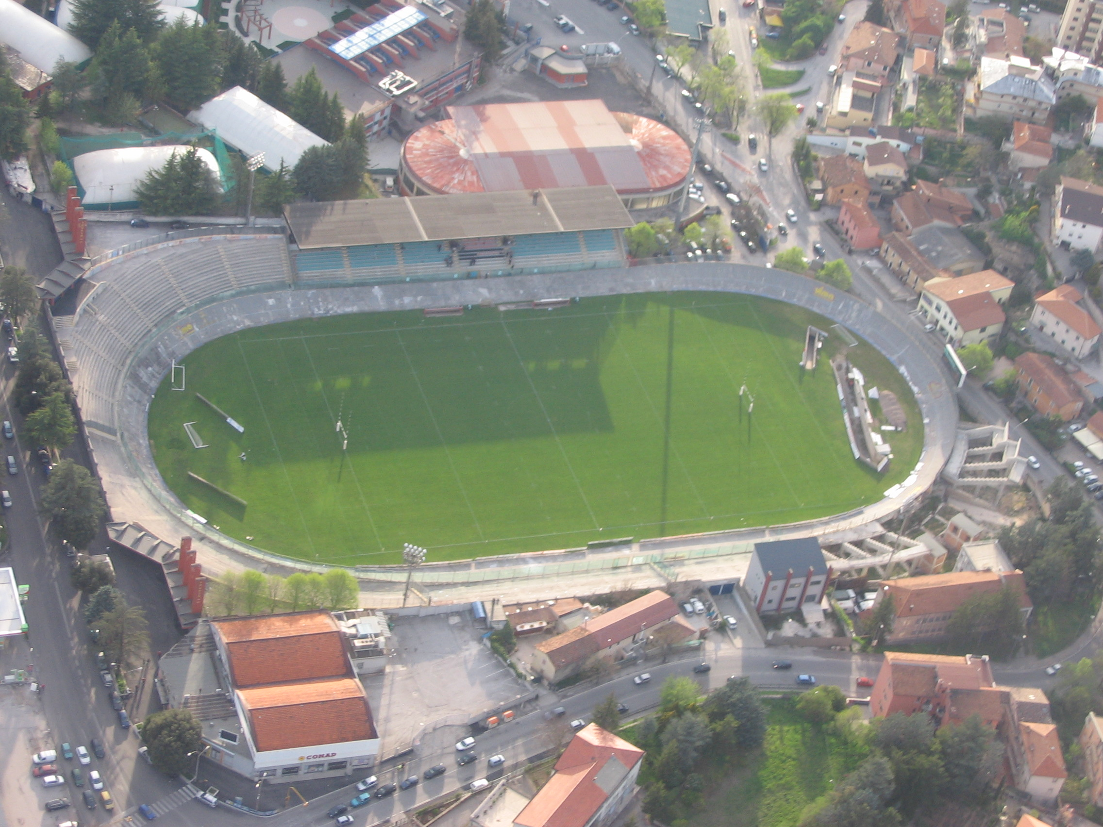 Stadio "Tommaso Fattori" L'Aquila